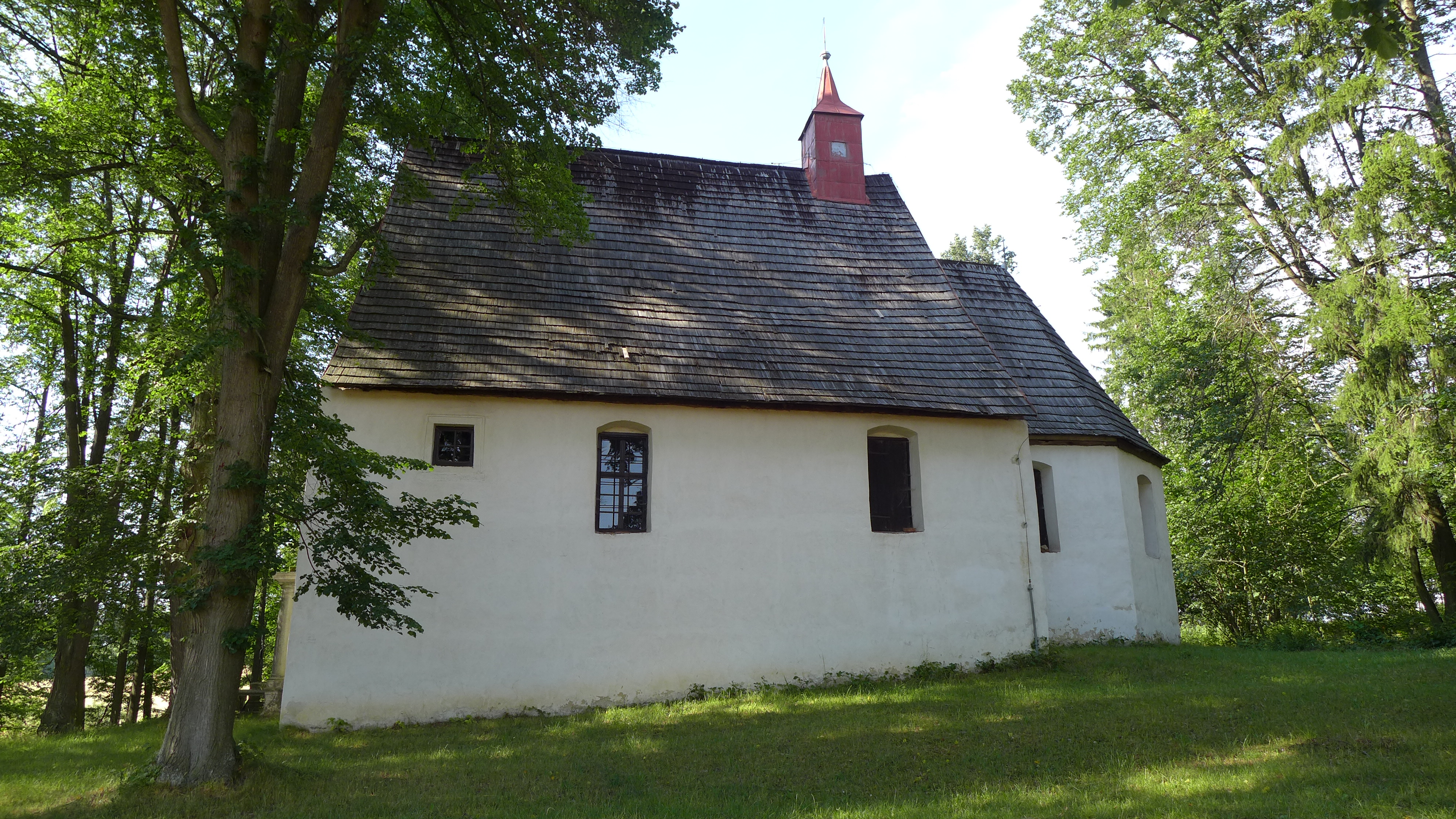 Kaple svatého Vojtěcha, jižně vsi, Studnice (Telč).